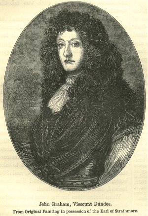 Viscount Dundee